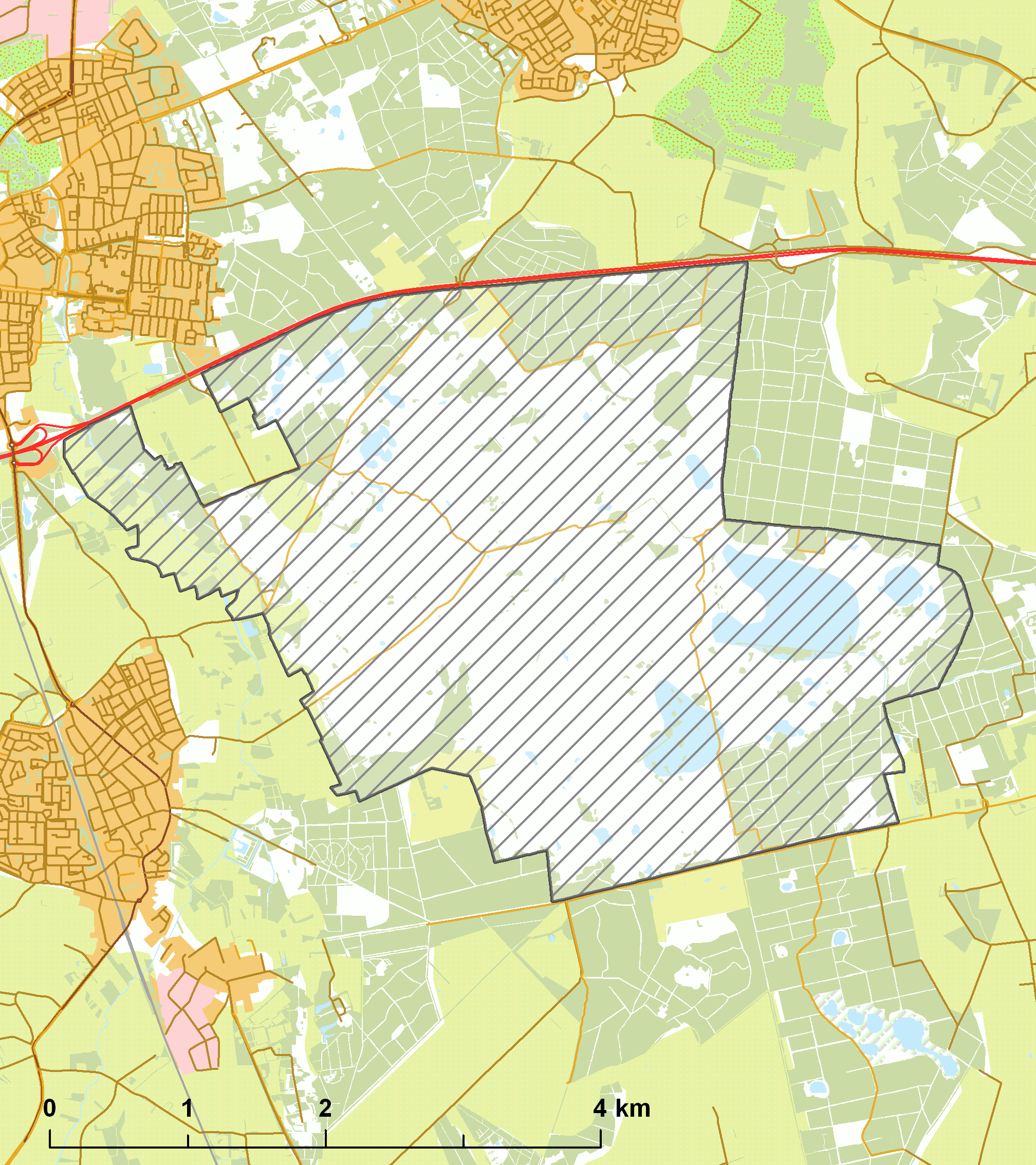 Natura2000 - Strabrechtse Heide & Beuven.png